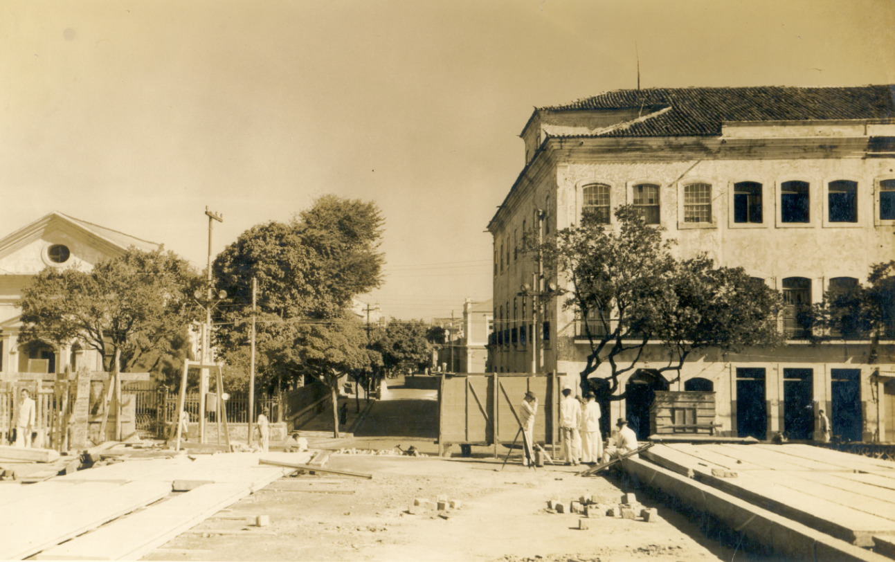 Construção da Ponte Duarte Coelho. Da esquerda para a direita: Igreja dos Ingleses; Rua Formosa (atual Avenida Conde da Boa Vista); e edifício-sede do jornal A Tribuna.